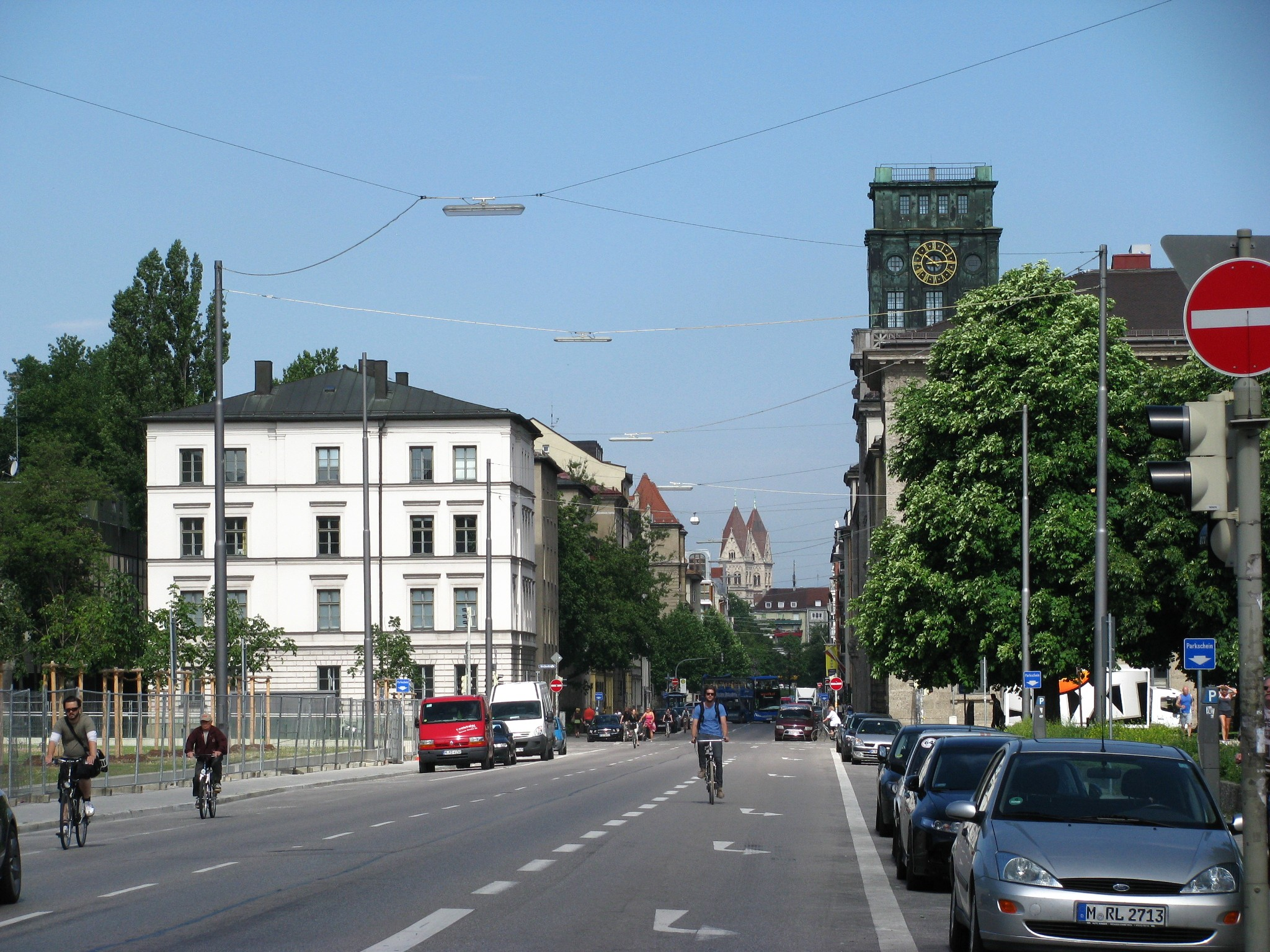 Die Gabelsbergerstraße in München im Bereich der Technischen Universität, Richtung Westen; im Hintergrund die katholische Pfarrkirche St. Benno